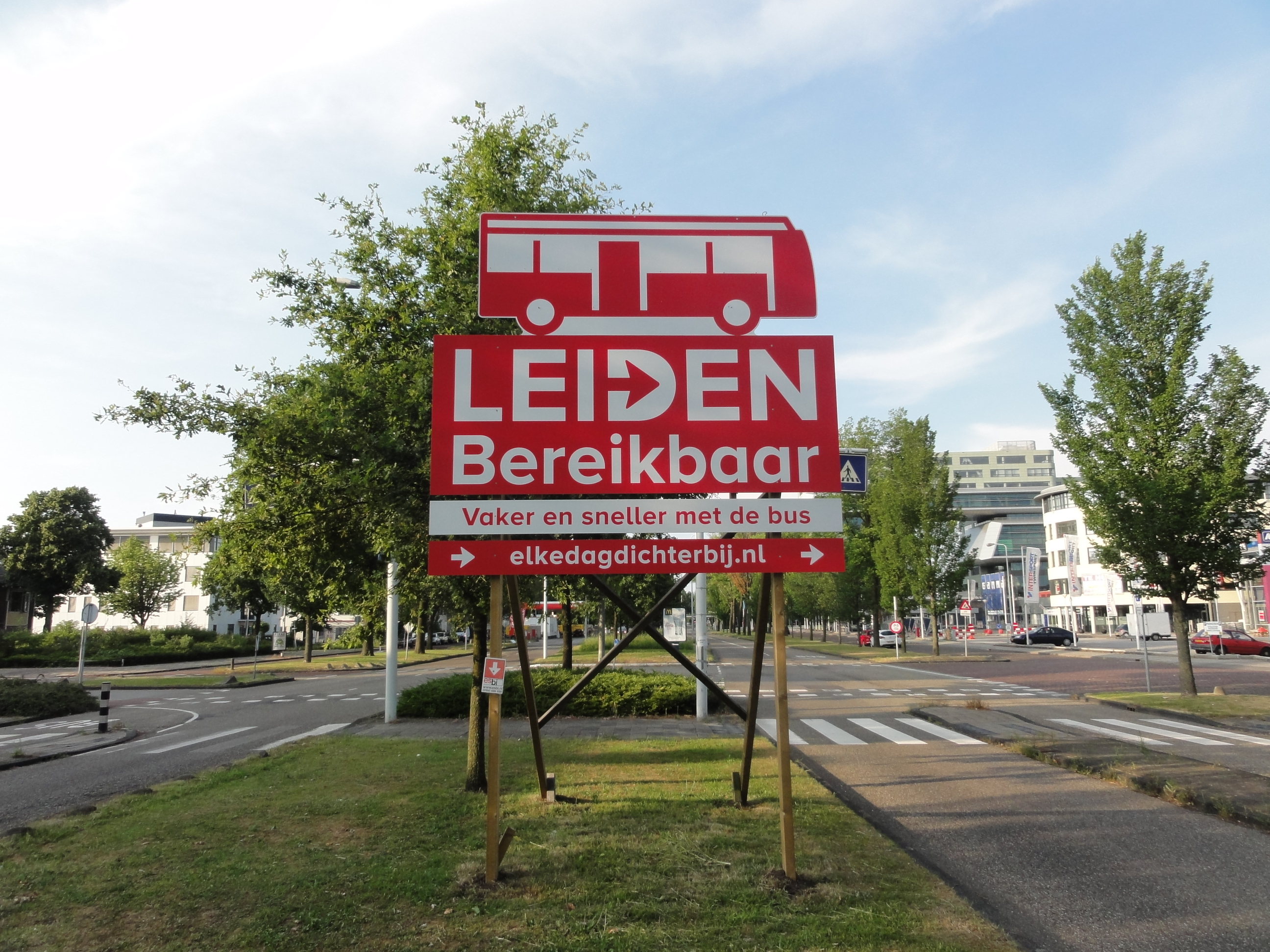 Leiden Bereikbaar. Bord in het kader van het verbeteren van de bereikbaarheid van Leiden.